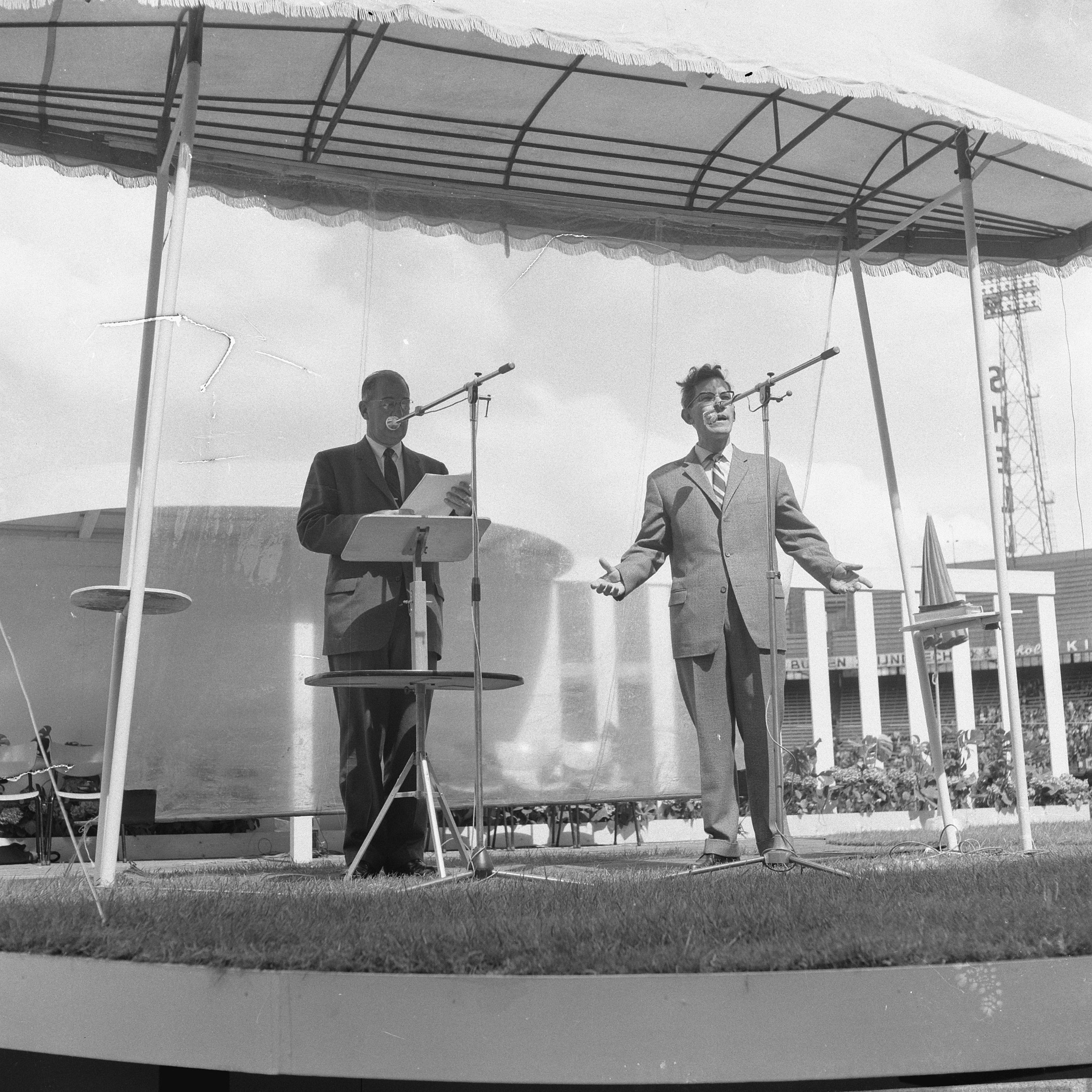 Collectie / Archief : Fotocollectie Anefo Reportage / Serie : [ onbekend ] Beschrijving : Jehovagetuigen te Rotterdam, de heer Knorr (algemeen wereldleider Jehova) tijdens zijn rede in de Kuip Datum : 3 juli 1965 Locatie : Rotterdam, Zuid-Holland Trefwoorden : Jehovagetuigen, redes Fotograaf : Voets, Jan / Anefo Auteursrechthebbende : Nationaal Archief Materiaalsoort : Negatief (zwart/wit) Nummer archiefinventaris : bekijk toegang 2.24.01.03 Bestanddeelnummer : 917-9335